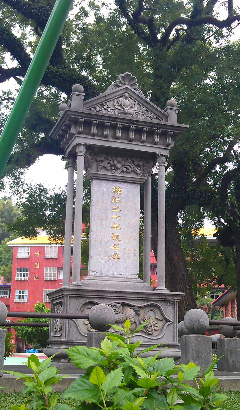 中文（台灣）: 櫟社二十年題名碑